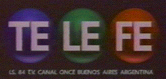 telefe 2º logo